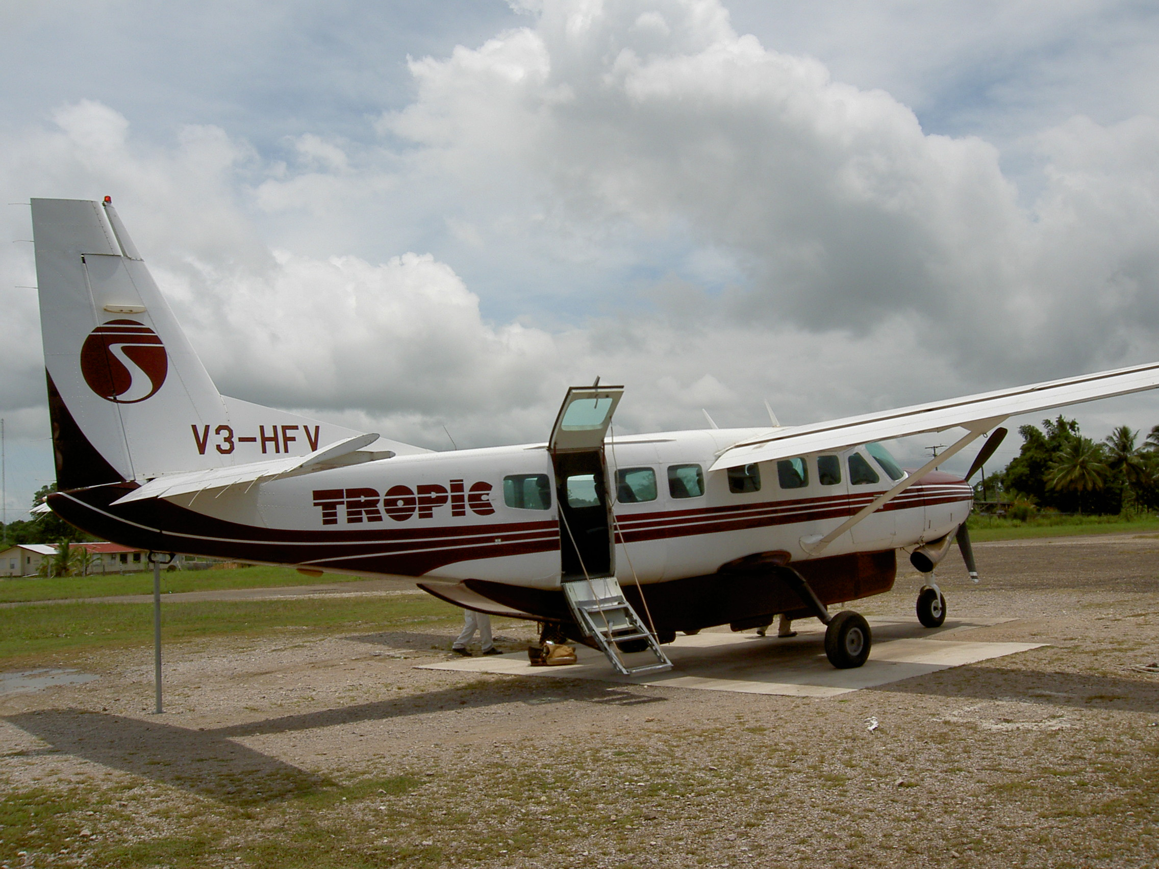 Viajes 2004